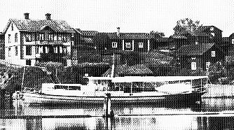 S/S Engelbrekt in Leksand, Sweden, 1890:ies